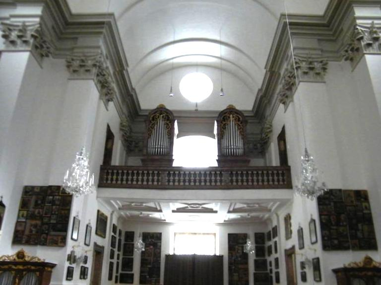 Mauracher-Orgel Kirchental